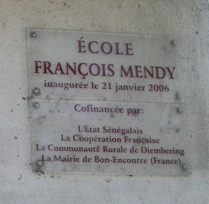 Ecole François Mendy à Carabane (Casamance, Sénégal)